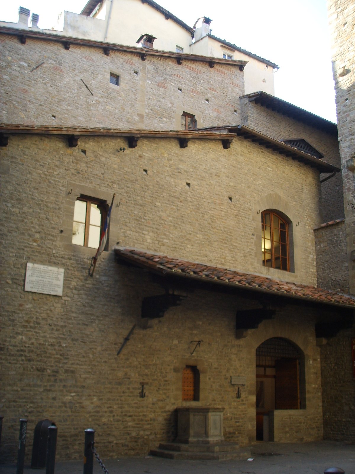 Casa di dante 02